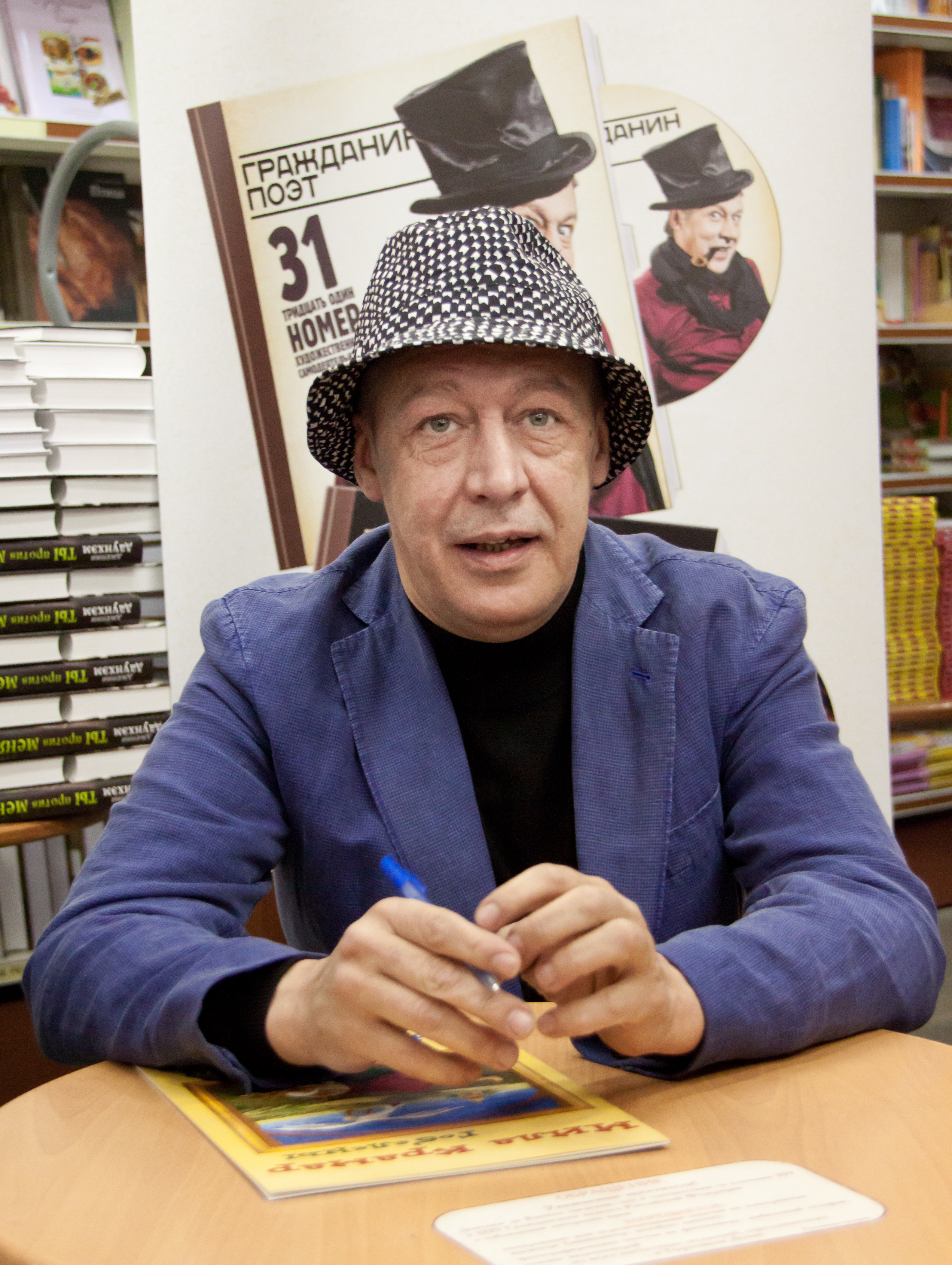 Михаил Ефремов (проект "Гражданин поэт")